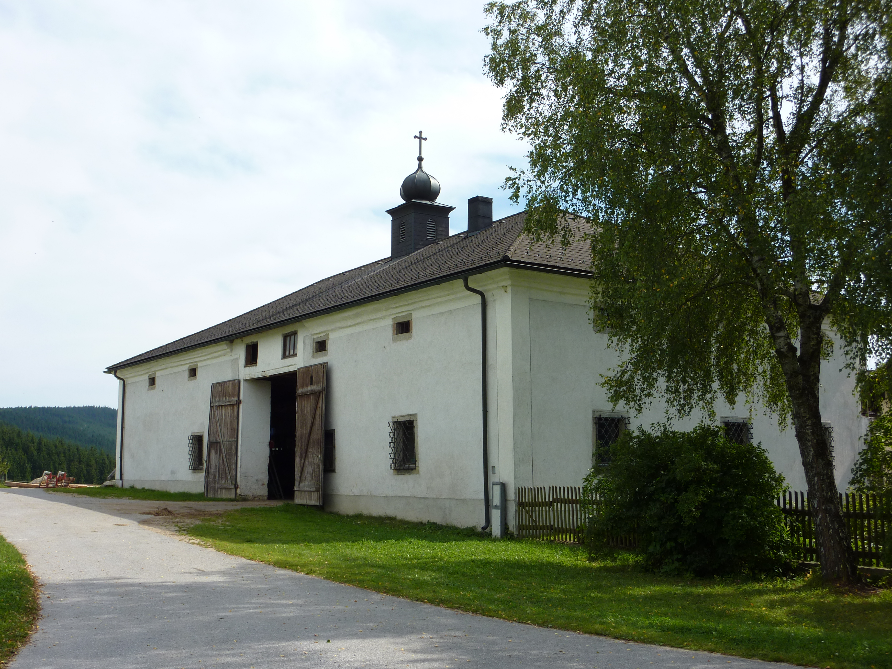 Wachtelhütte, ehem. Glashütte und Brauerei, in Dietrichsbach 1, Altmelon, Niederösterreich